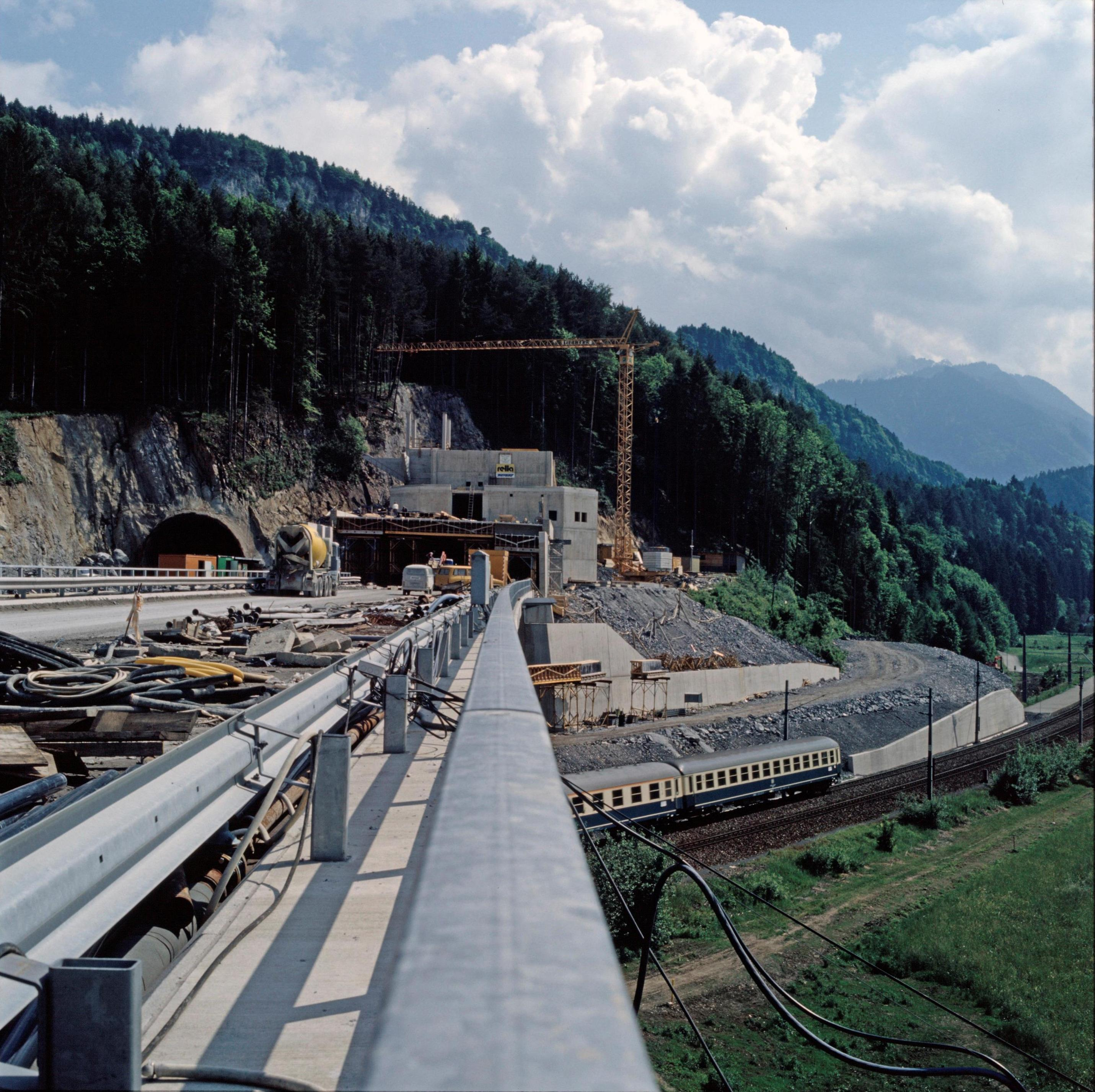 Baustelle am Nordportal des Ambergtunnels im August 1984. Blick auf die (erste) Tunnelröhre, Blickrichtung Süden (heute Einfahrt in Fahrtrichtung Bludenz/Innsbruck, von Bregenz kommend). Unter der Autobahntrasse verkehrt ein Regionalzug auf der Vorarlbergbahn.